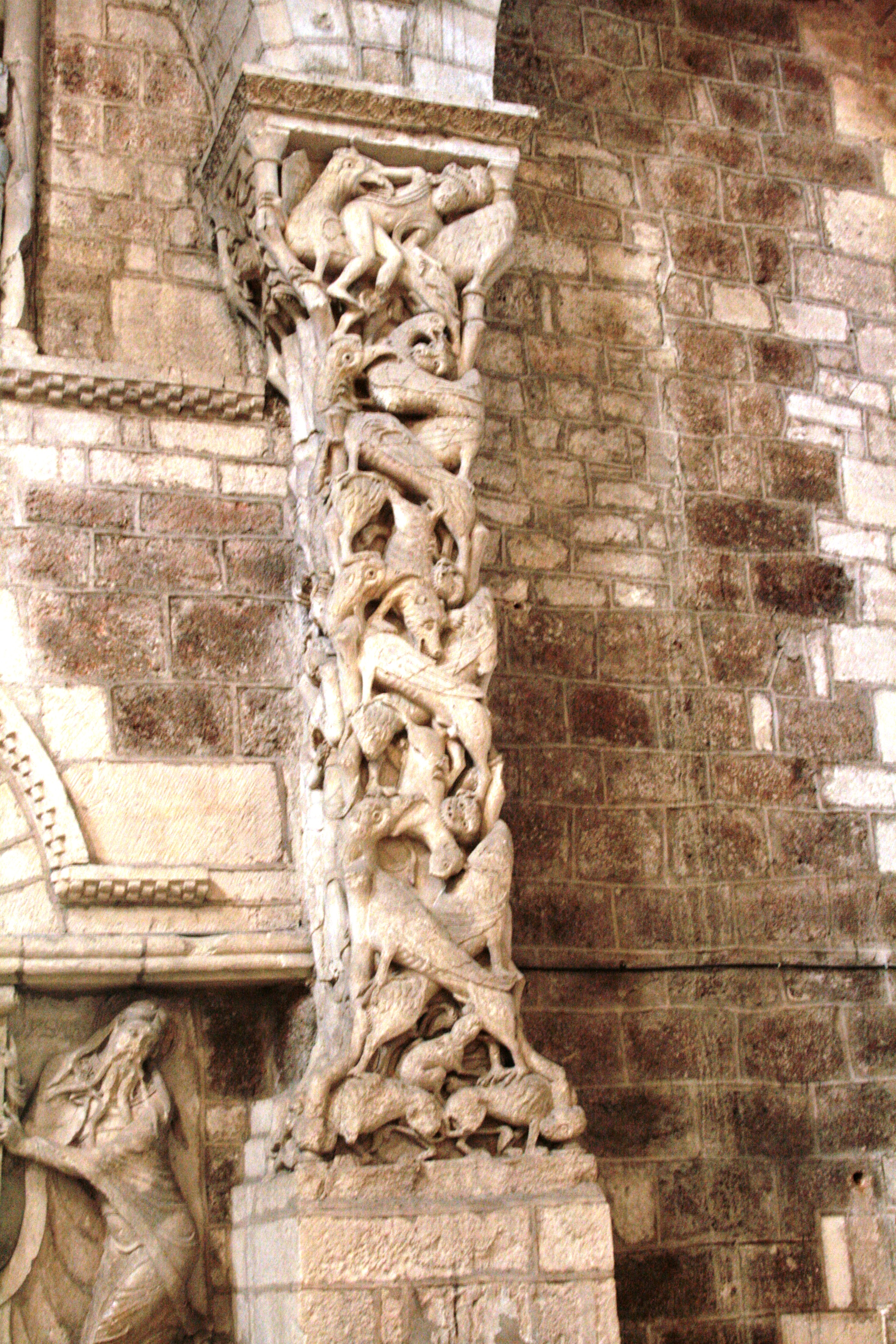 Souillac (Lot, France). Le "Pilier de Souillac", XIIe siècle, art roman. Monstres infernaux et image du péché.